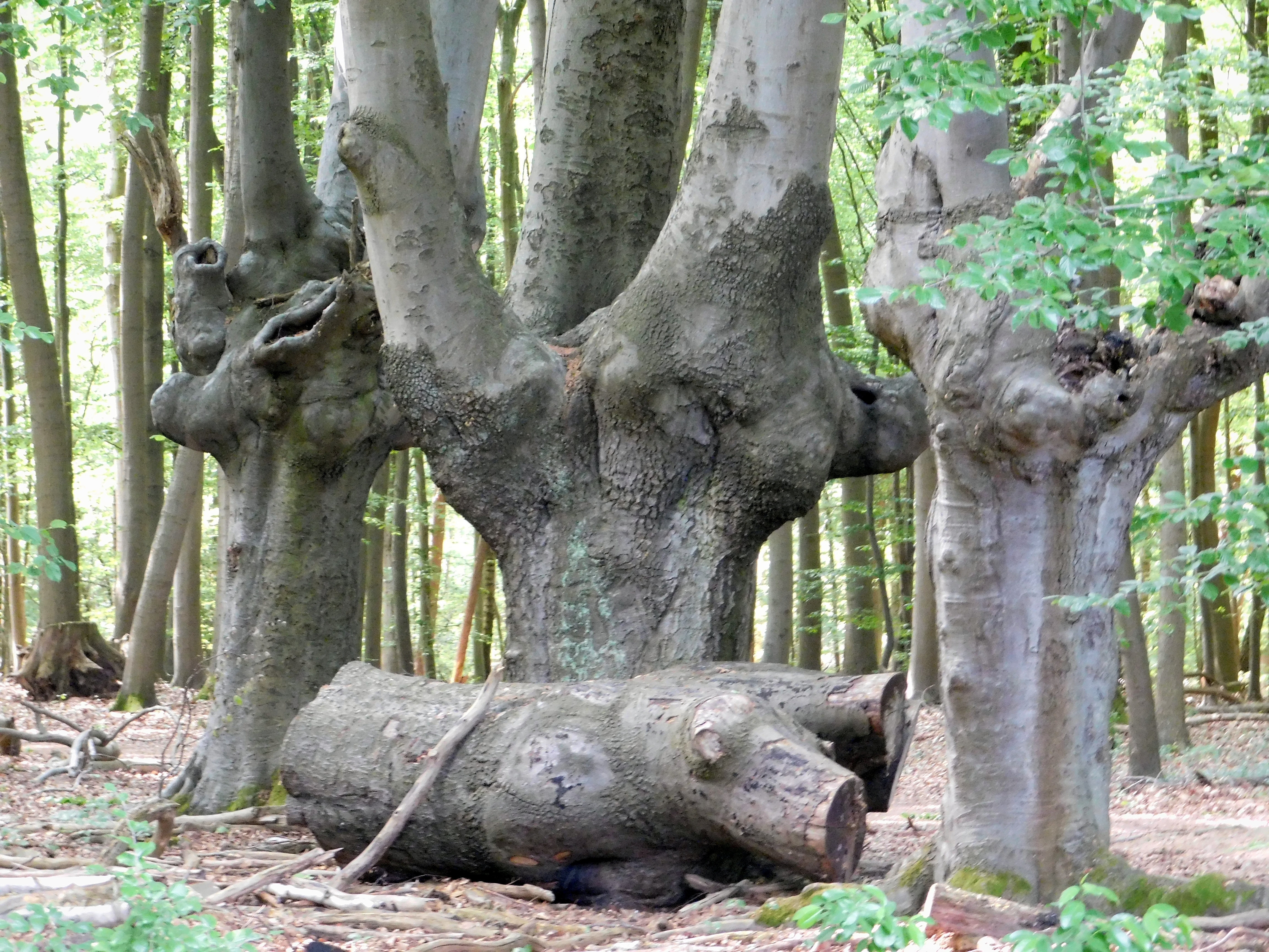 Knorrige Buchen im Landschaftsschutzgebiet Dünnwalder Wald (LSG 4908-0024) in Köln, Nähe Nittum.